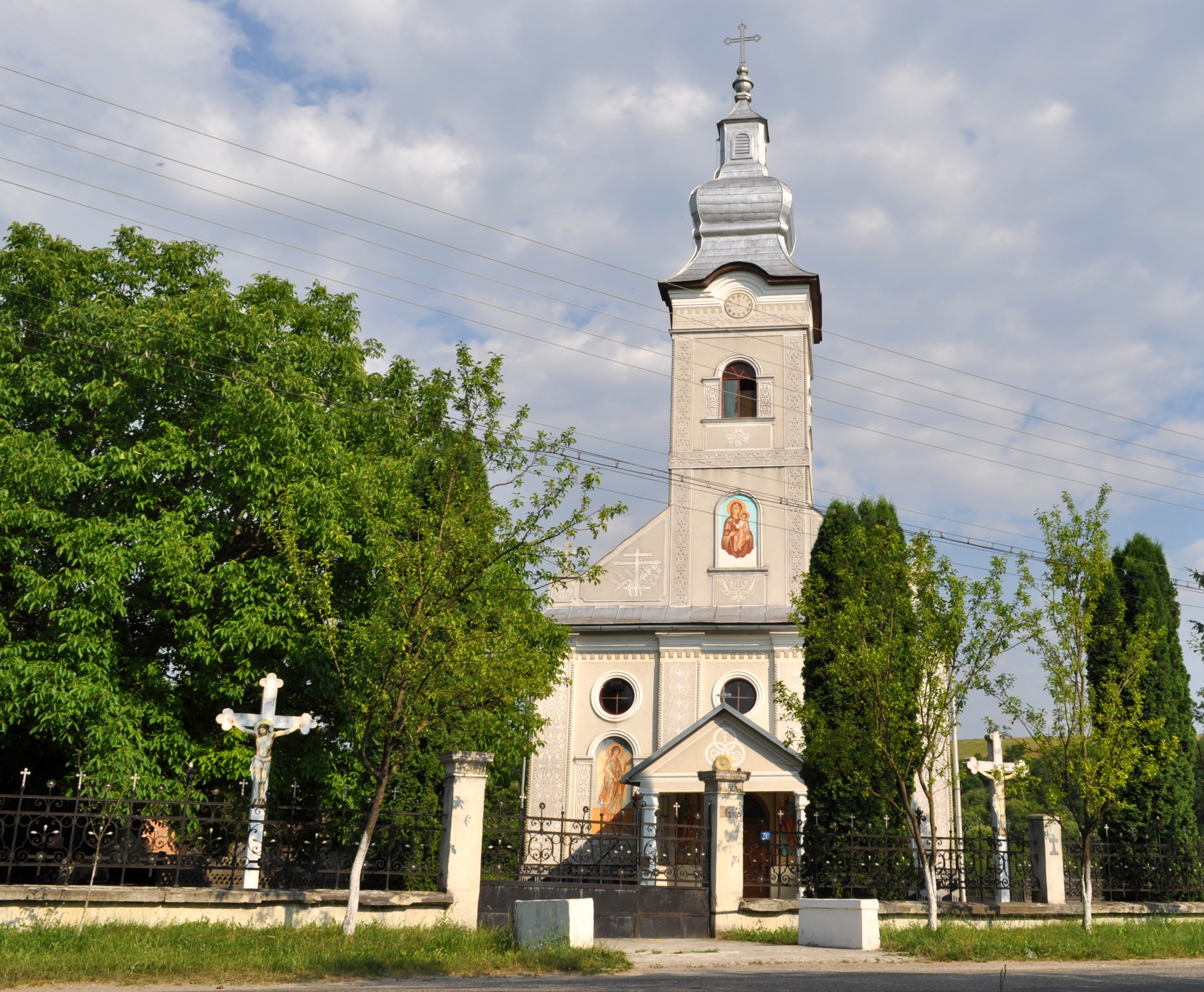 Mica, județul Cluj